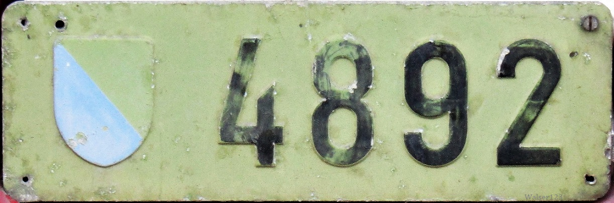 Altes Traktorkontrollschild (bis 1960) aus dem Kanton Zürich